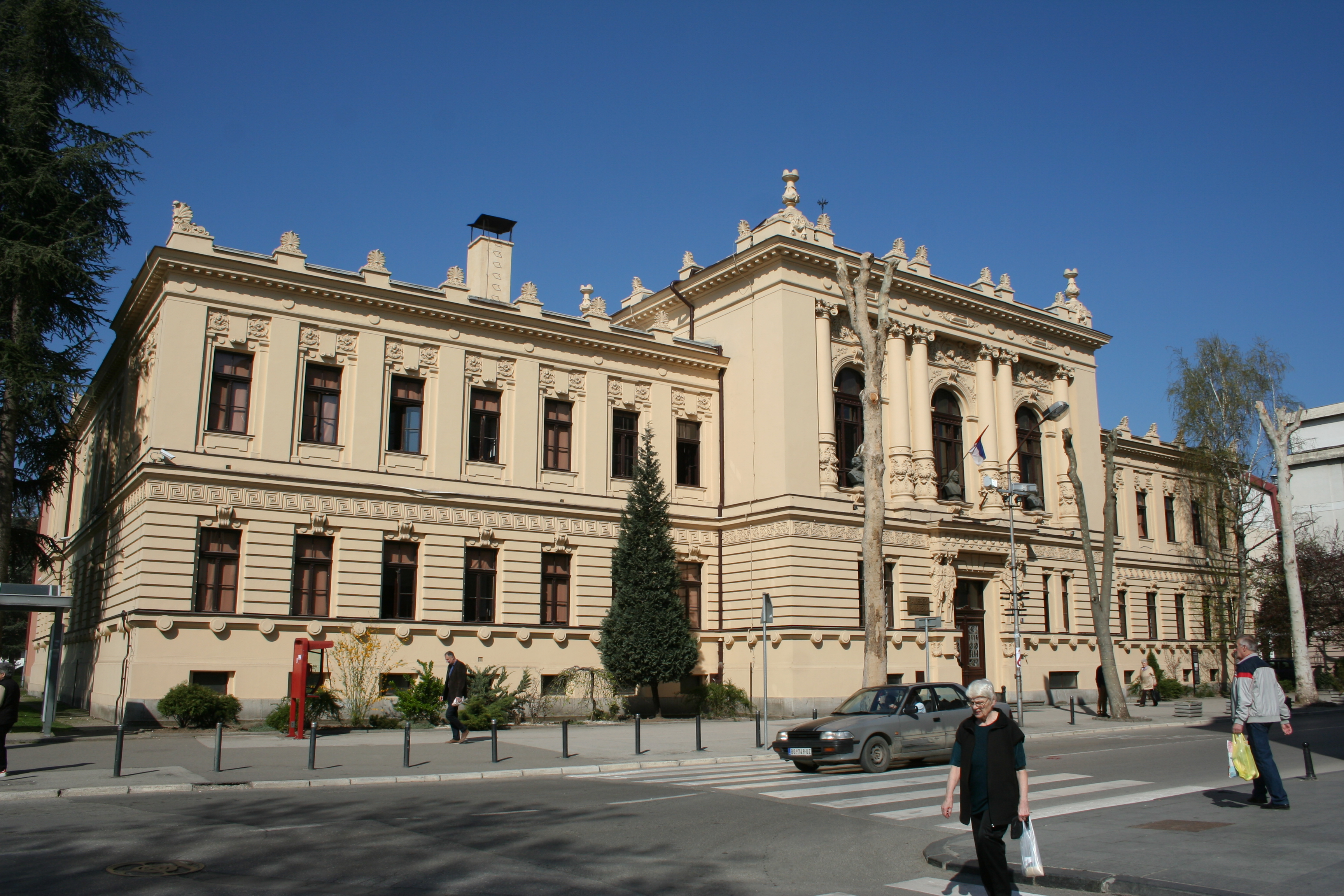 Zgrada gimnazije, Valjevo